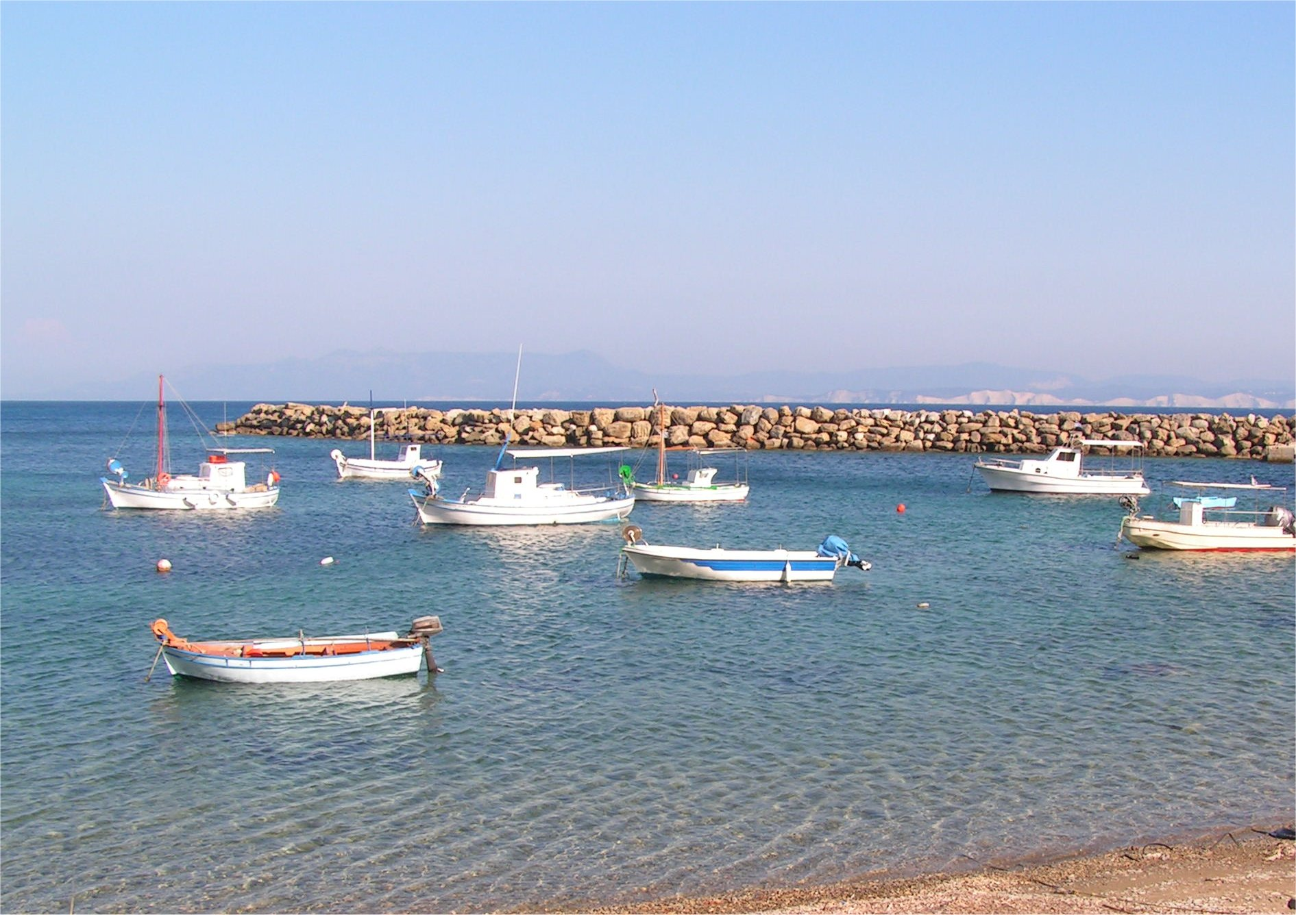 Deze foto is in mei 2006 genomen door de initiele auteur van deze bijdrage, toen hij tijdens een zeilreis de haven van Erikoussa aandeed. Op de foto is de haven van Porto op Erikoussa te zien met op de achtergrond de kliffen aan de noordkust van Korfoe.